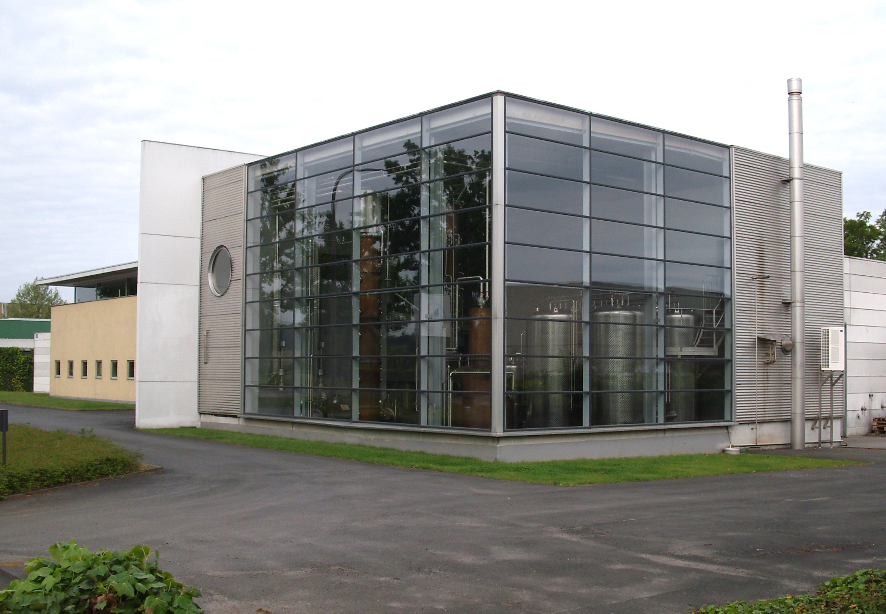 Graanstokerij Braeckman - Leupegem - Oudenaarde - Oost-Vlaanderen - Vlaanderen - België